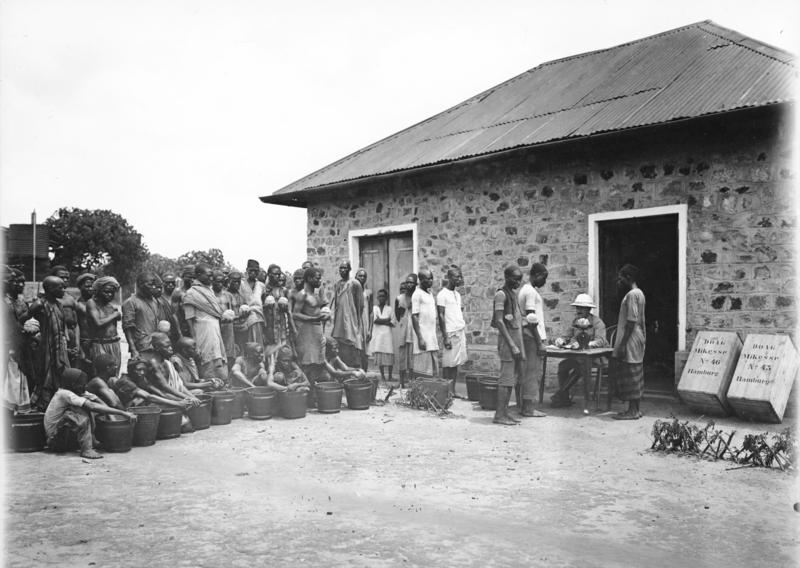 Abwiegen von Kautschuckzapfergebnisse